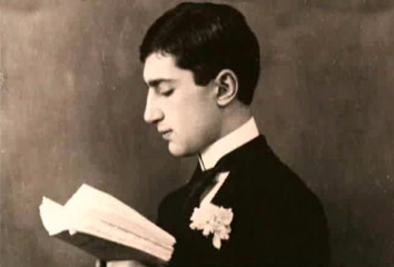 Фотография Ильи Зданевича